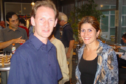 Harmen Jonkman end Tea Bosboom-Lanchava